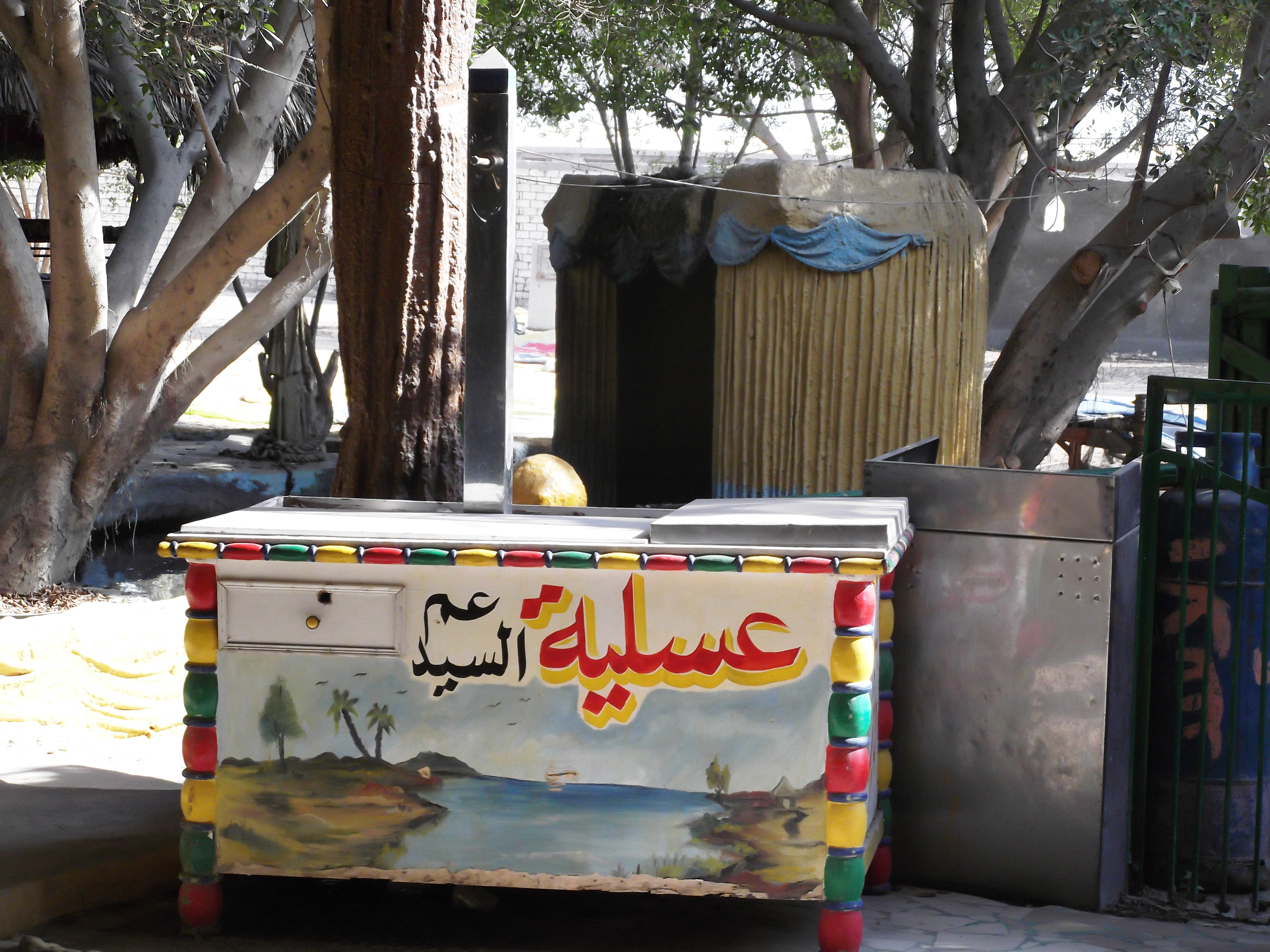 عربية عسلية، نموذج مصري. This is an image of food from Egypt